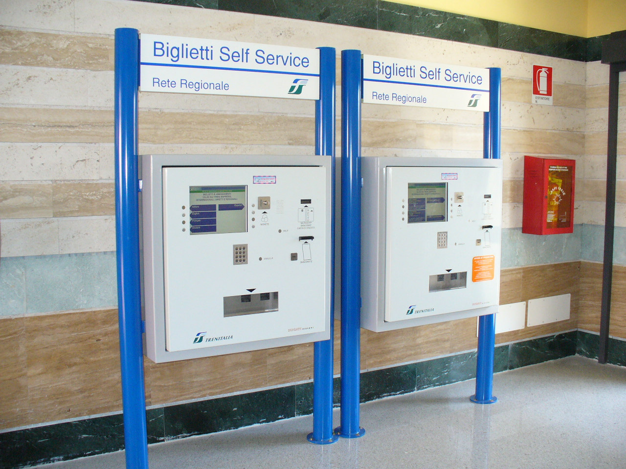 Biglietteria regionale self-service a Catanzaro Lido